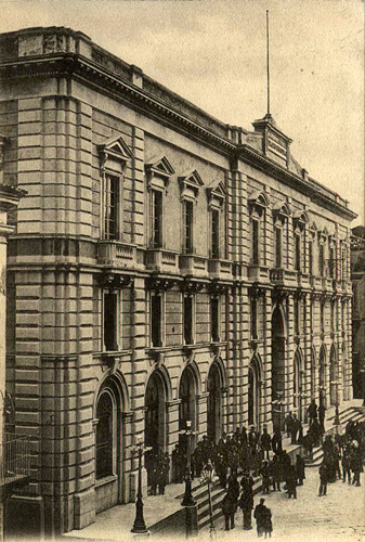 old postcard - Reggio Calabria - Il vecchio palazzo municipale. Immagine antecedente al 1908 quindi PD